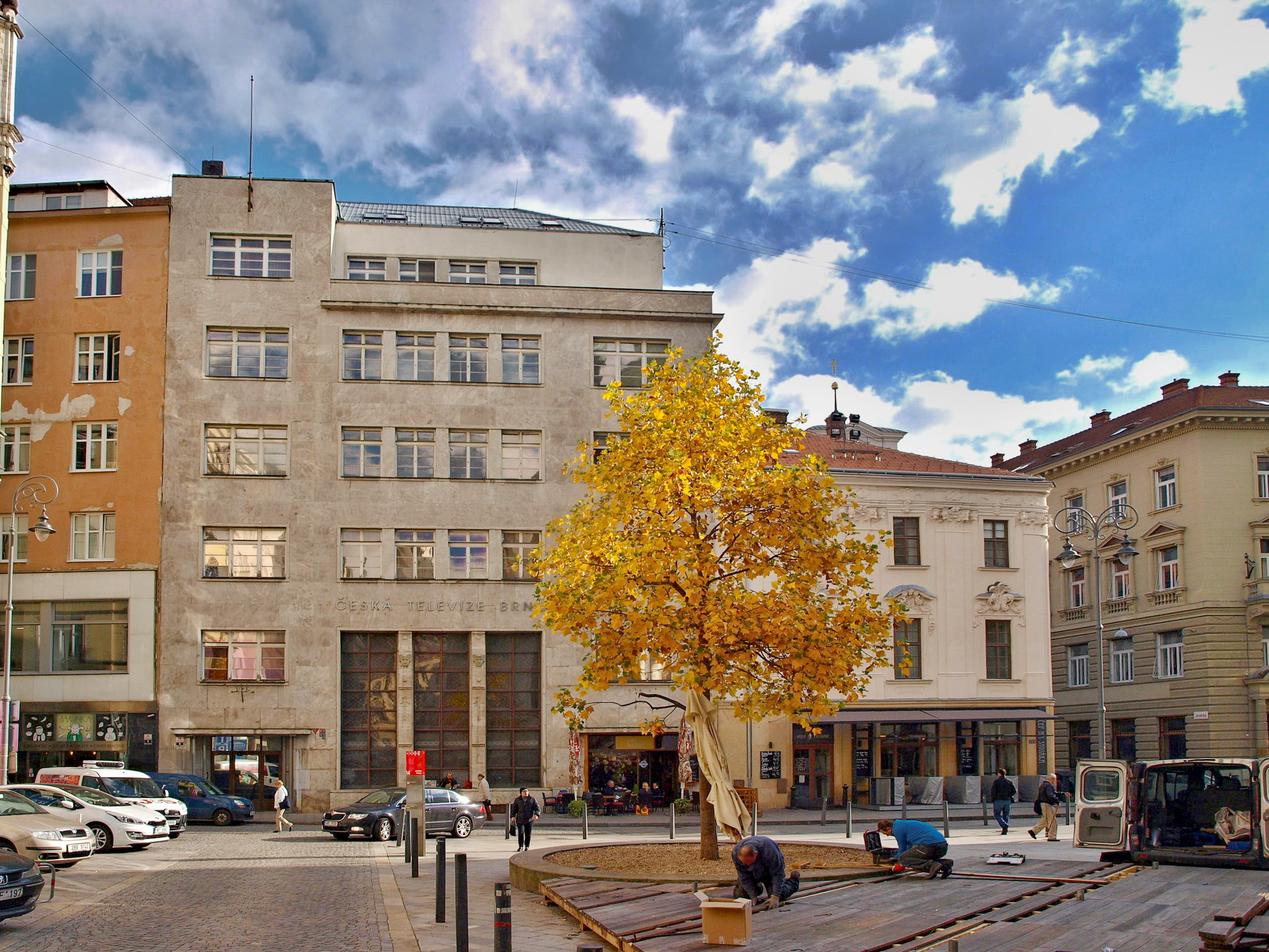 Jakubské náměstí